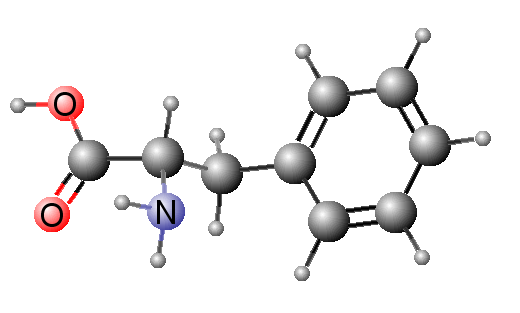 Molekulární­ geometrie fenylalanin